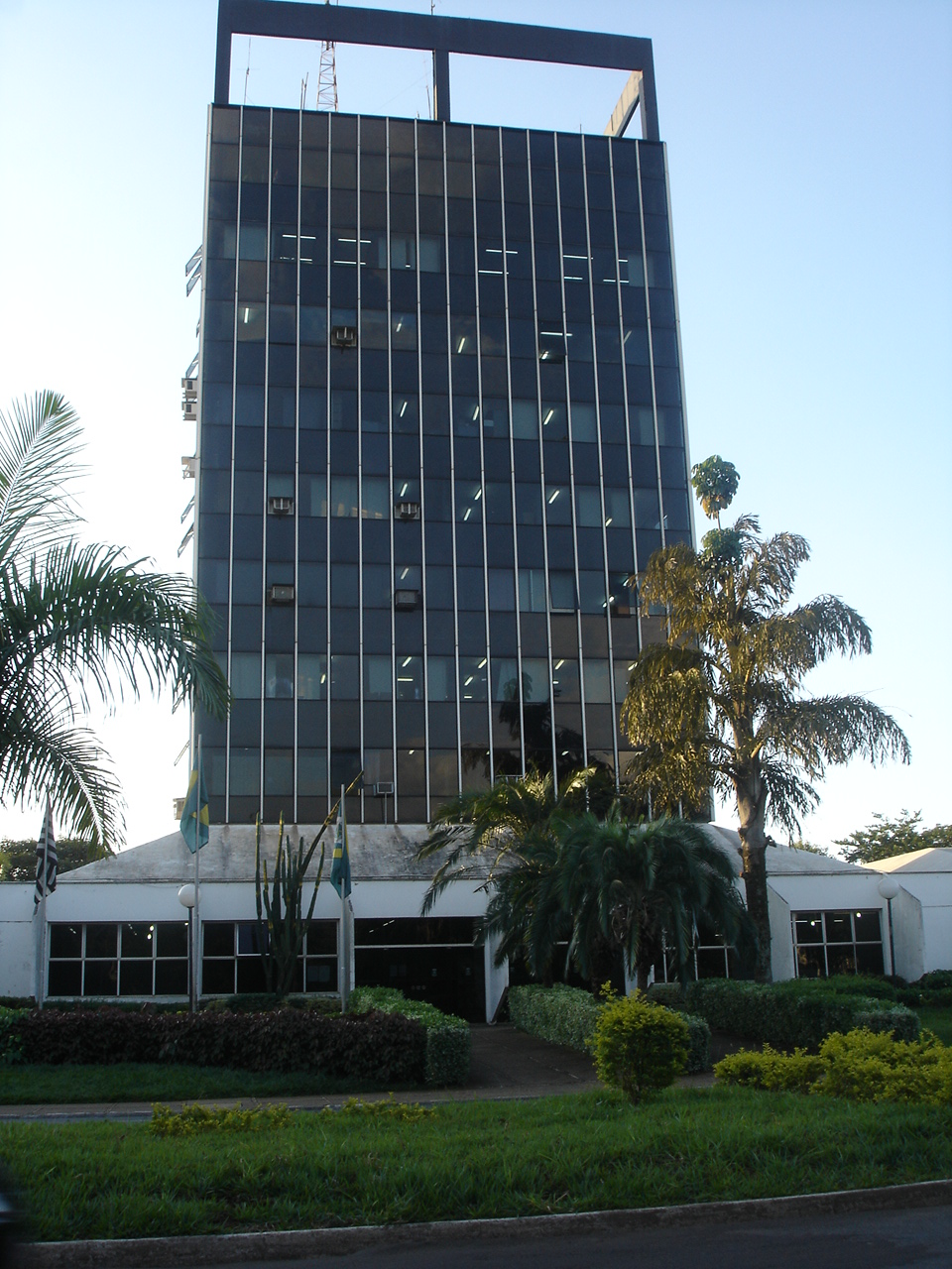 Prefeitura de Santa Bárbara d'Oeste Santa Barbara d'Oeste (Brazil) city hall author: Daniel Candido